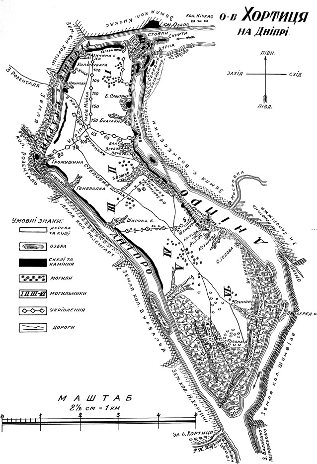 Карта острова Хортица Якова Новицкого.